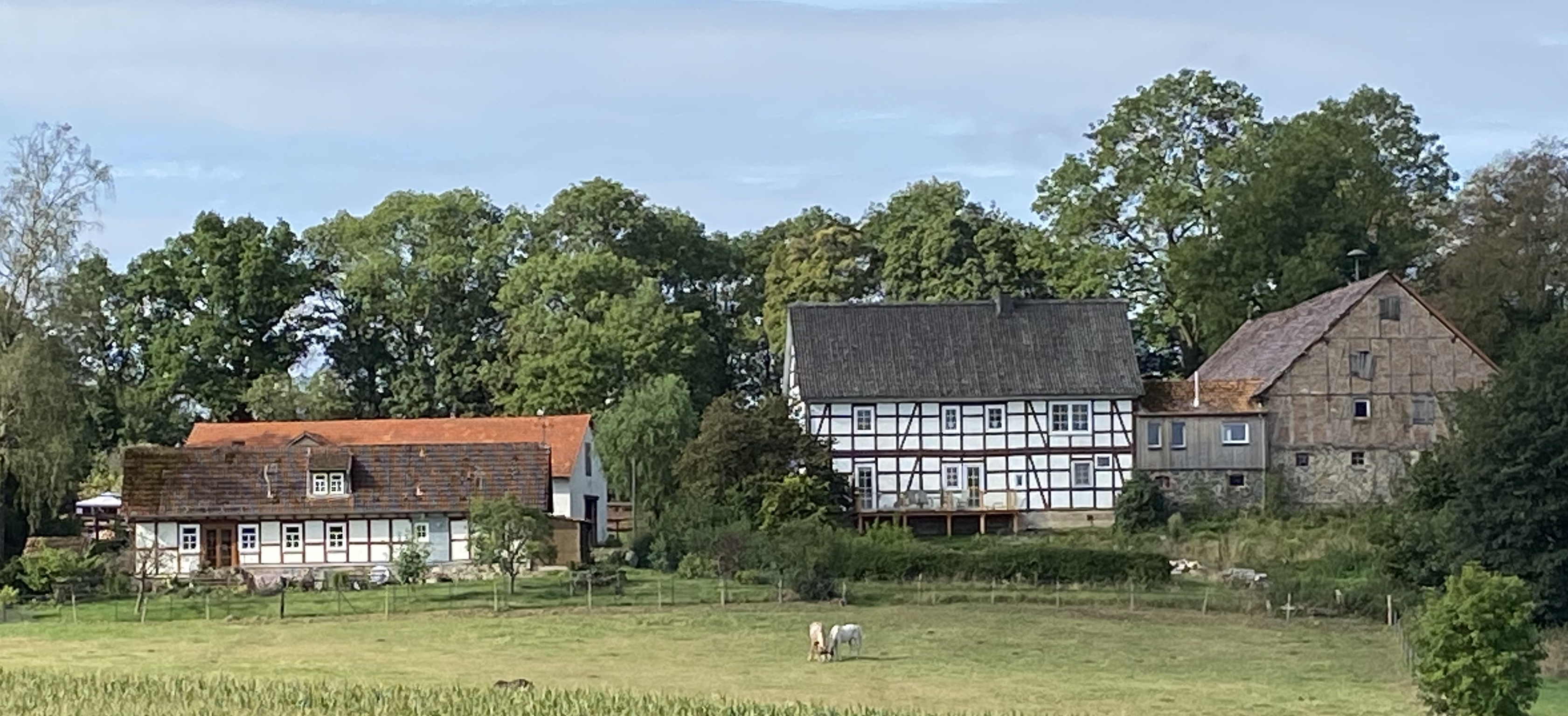 Ansicht von Osten